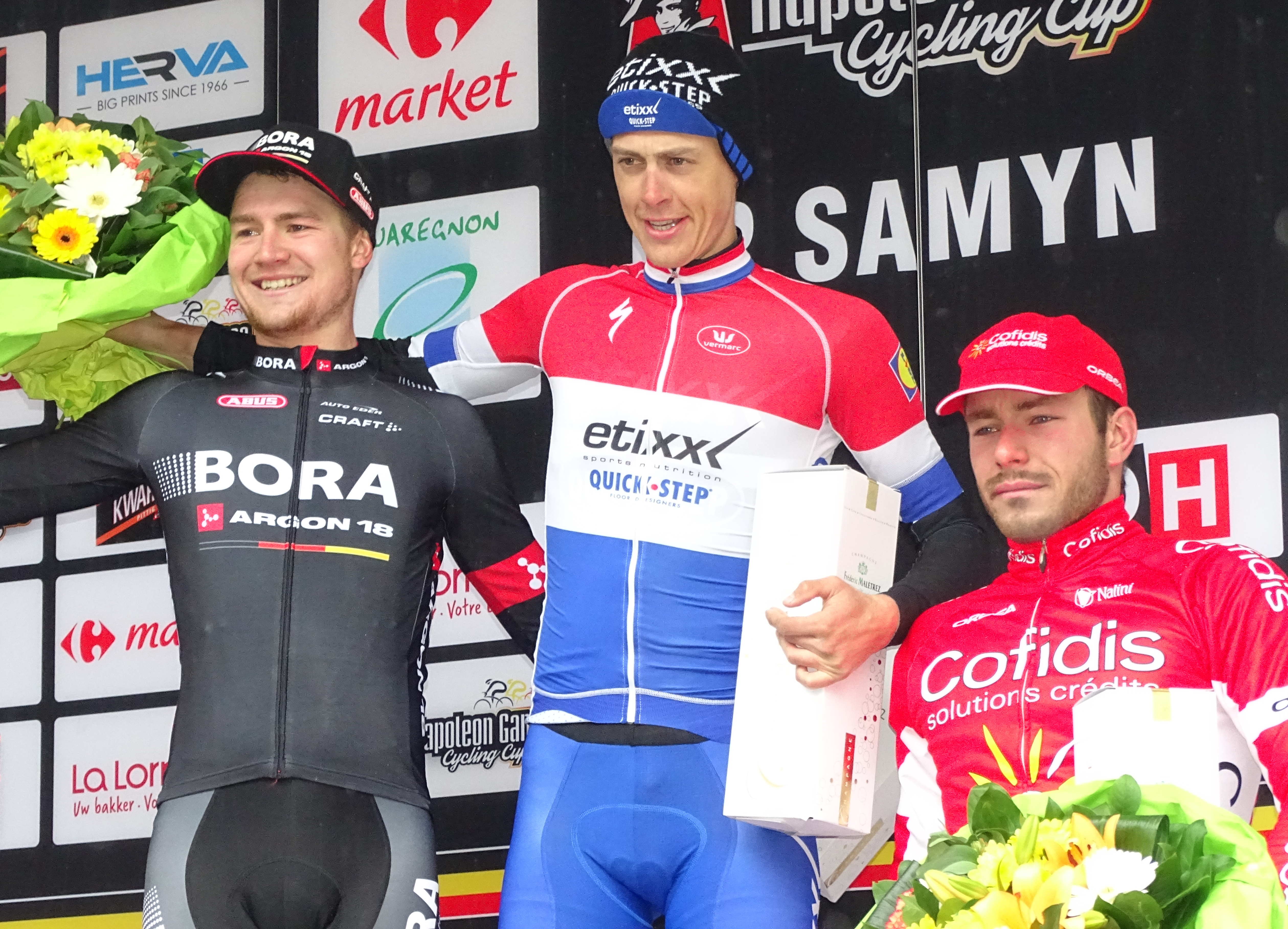 Reportage réalisé le mercredi 2 mars à l'occasion de l'arrivée du Samyn des Dames 2016 et du Samyn 2016 à Dour, Belgique.